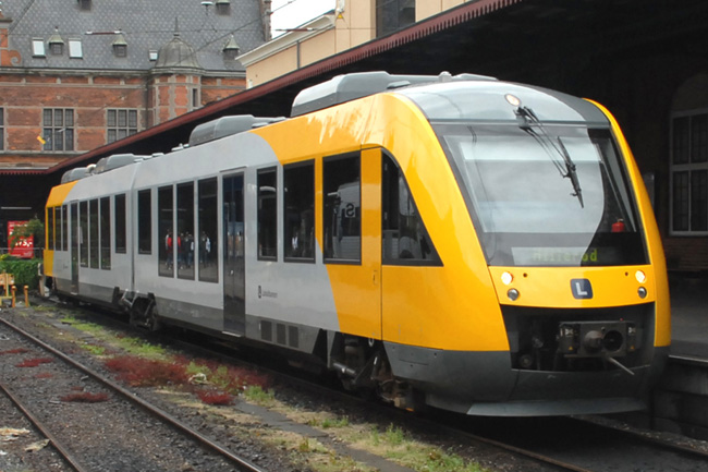 Helsingør treinstel Lokalbanen op 22 juli 2007 richting Hillerød